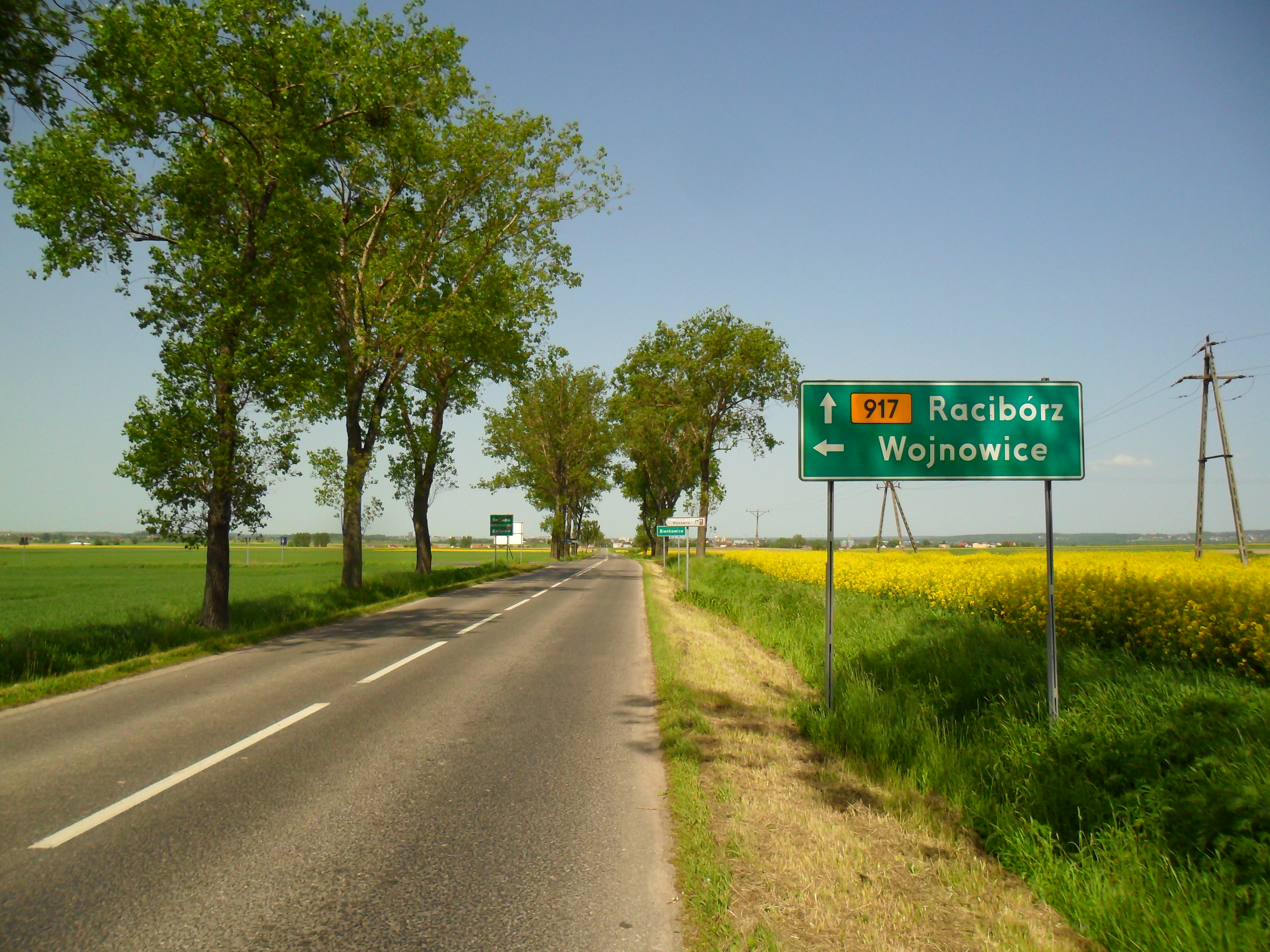 Droga wojewódzka nr 917 na trasie pomiędzy Bojanowem, a Raciborzem (widok w kierunku Raciborza)